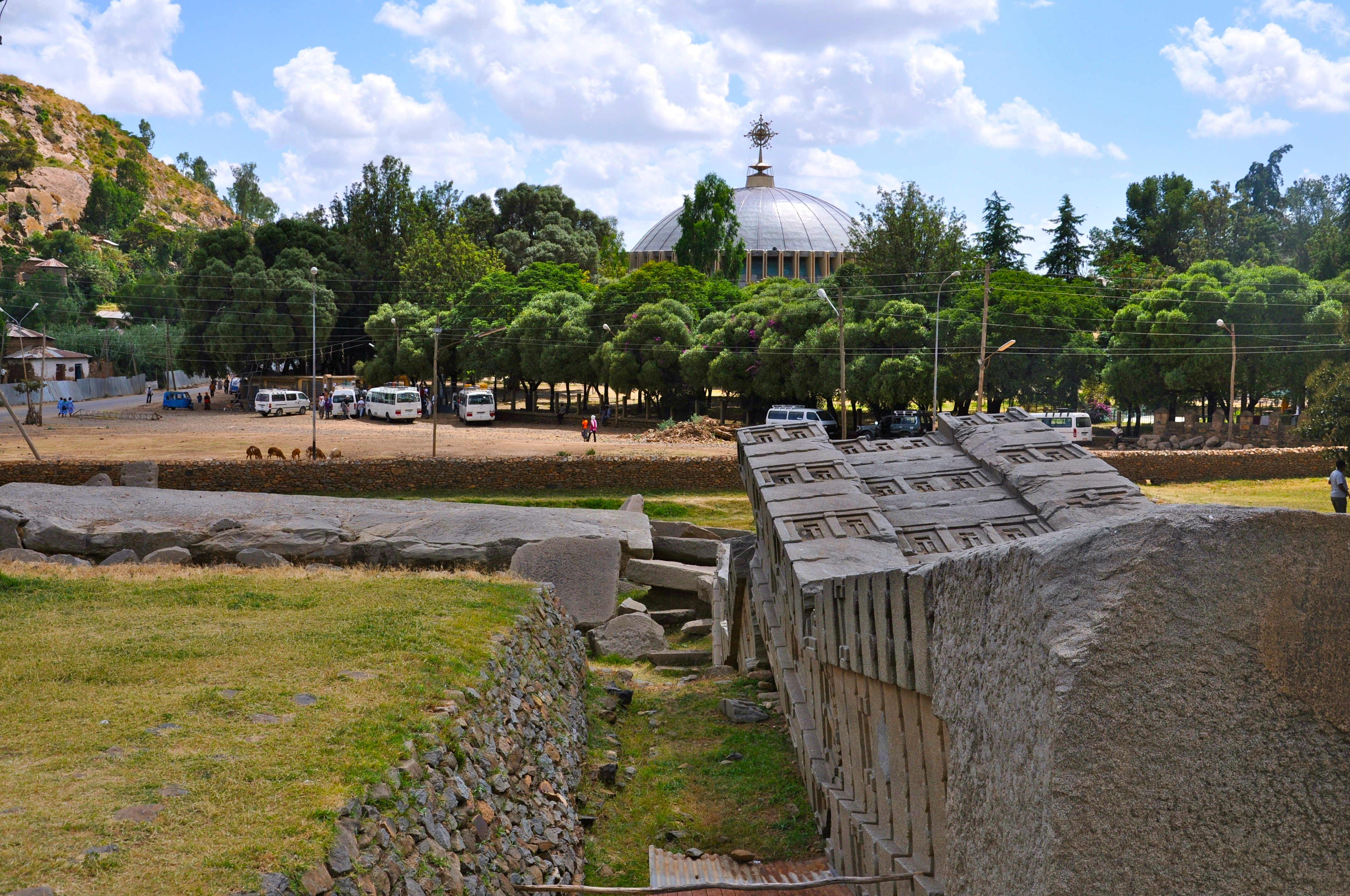 Diese bereits vor Jahrhunderten umgestürzte Stele wiegt angeblich über 500 Tonnen